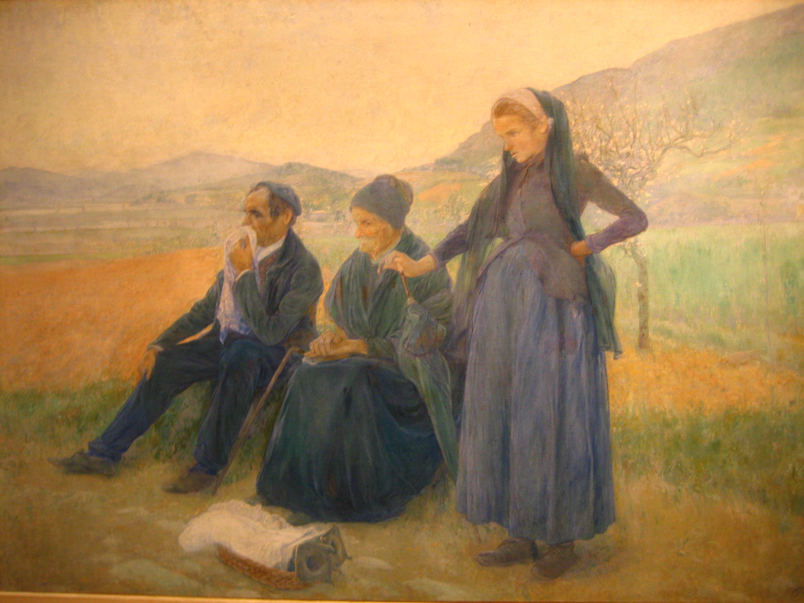 De promesa, obra del pintor bilbaíno Adolfo Guiard